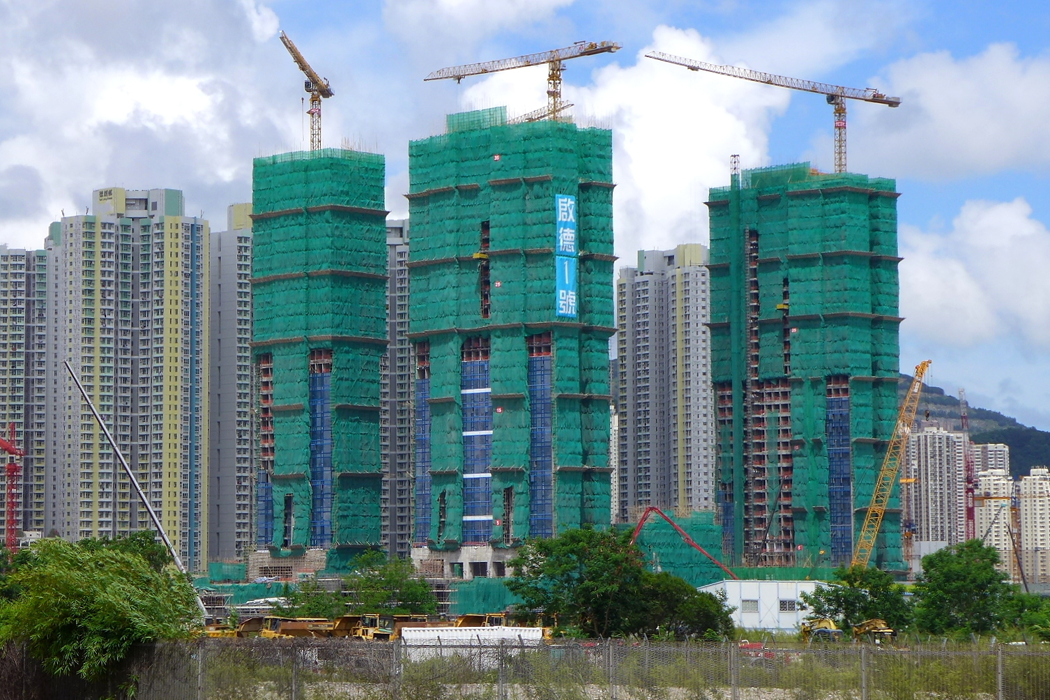 One Kai Tak site